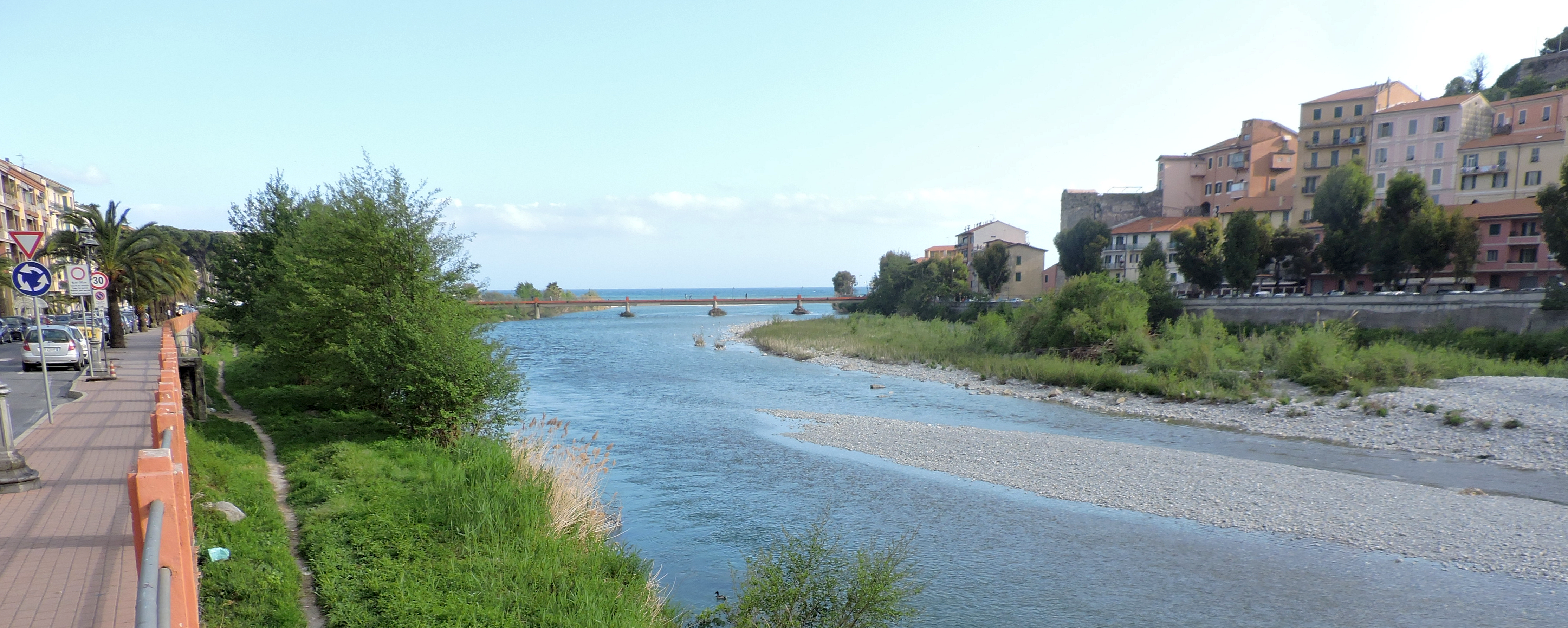 Fiume Roia (Q49961308)